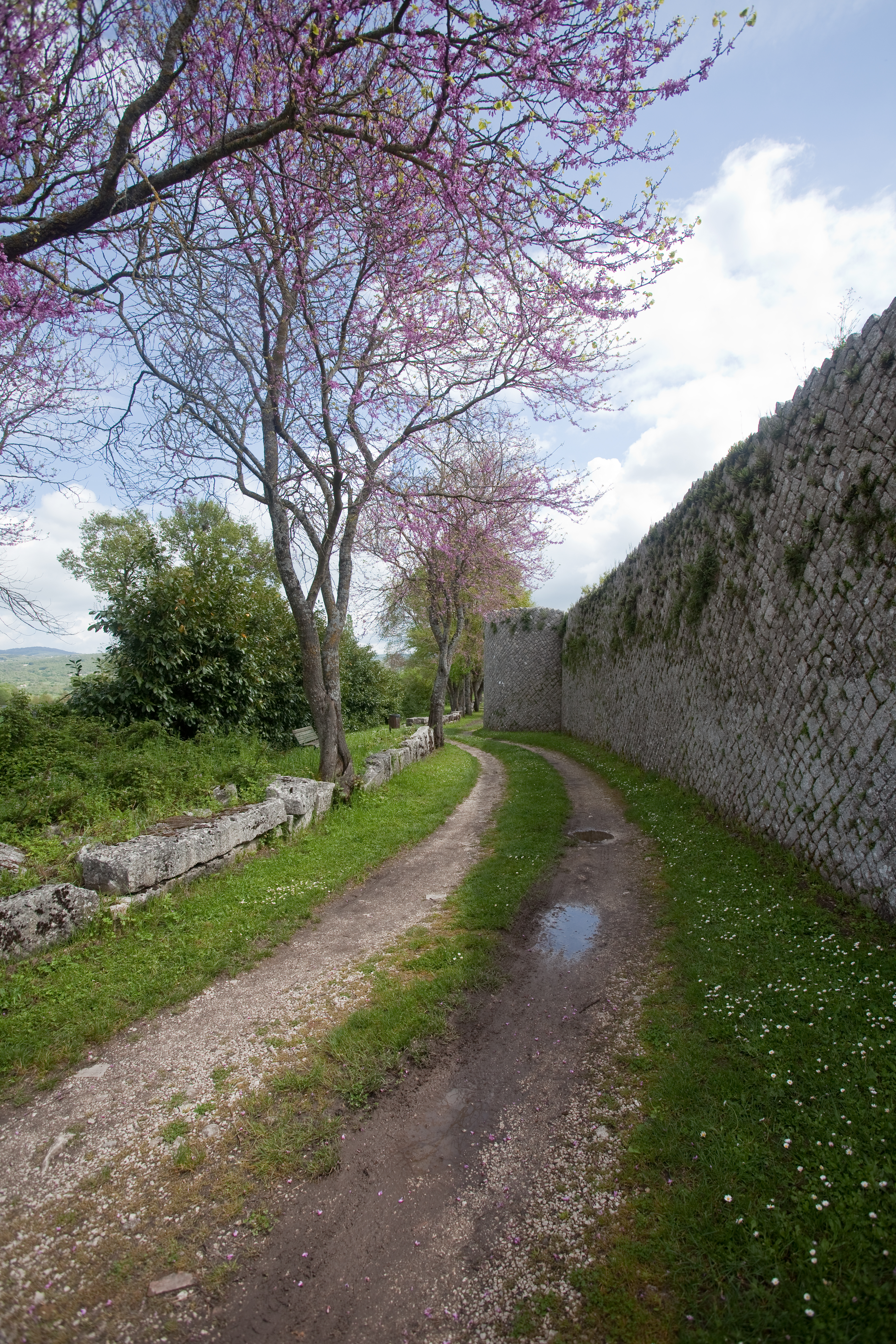 Area archeologica - MIBAC This is a photo of a monument which is part of cultural heritage of Italy.